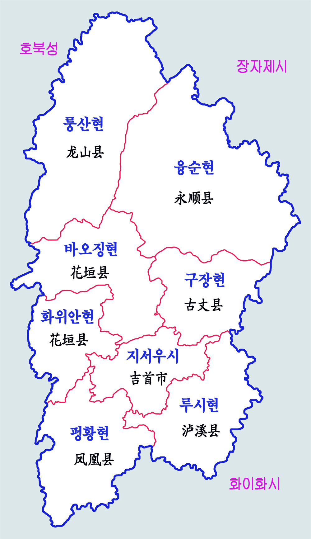 샹시 투자족마오족자치주 행정구역도